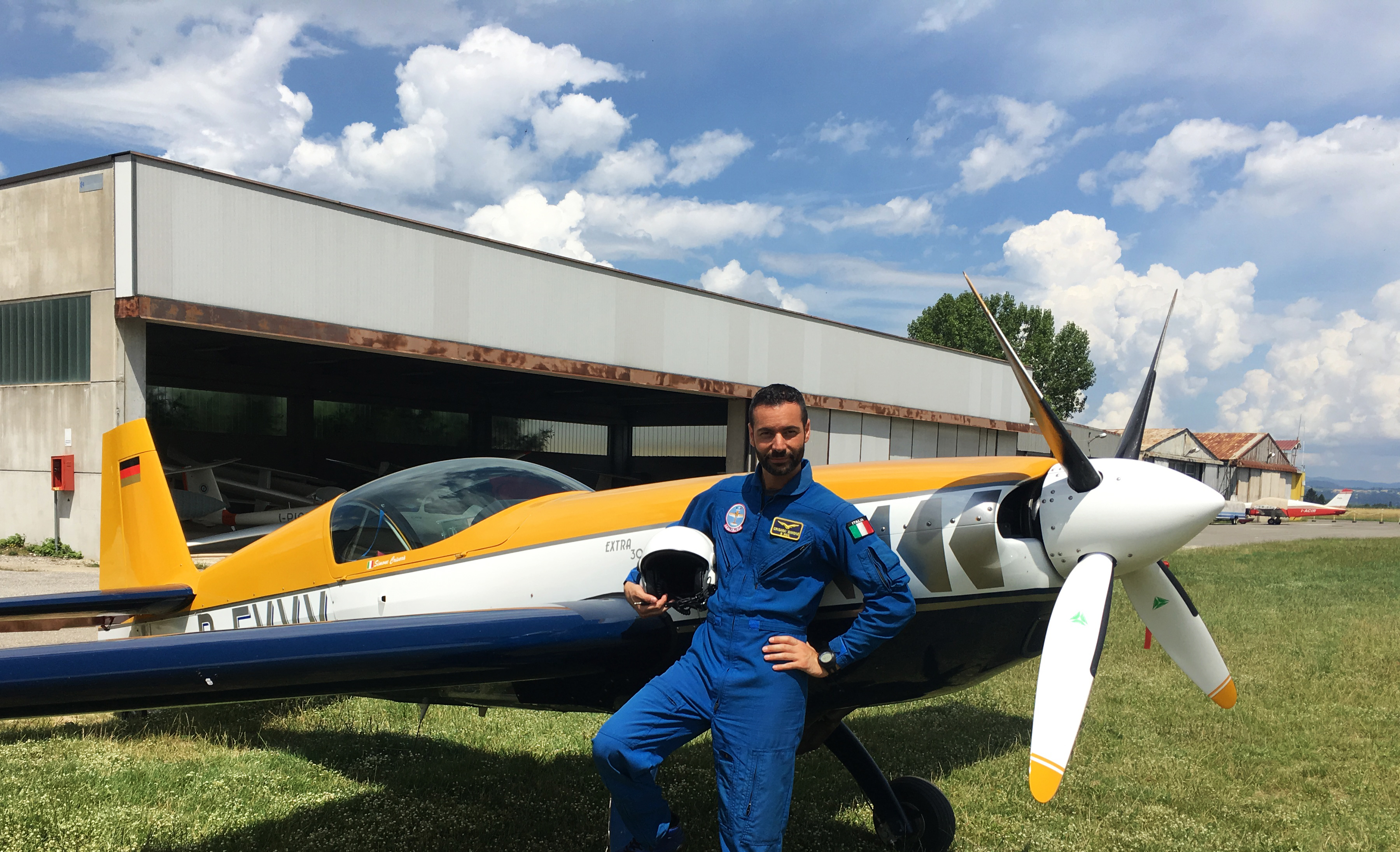 Simone Crisarà appena atterrato dopo una sessione di allenamento acrobatico presso l'aeroporto di Rieti